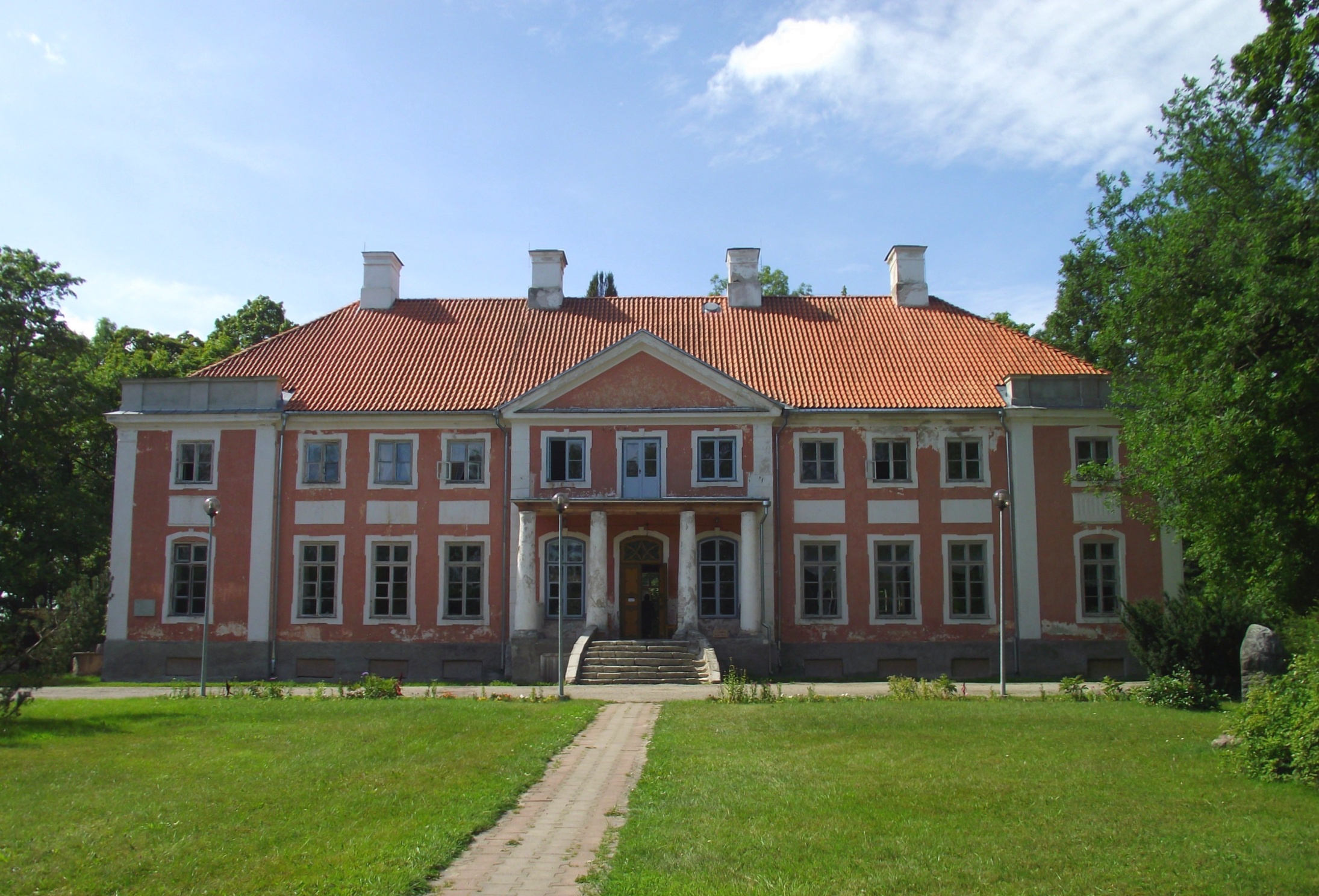 Sargvere mõisa peahoone